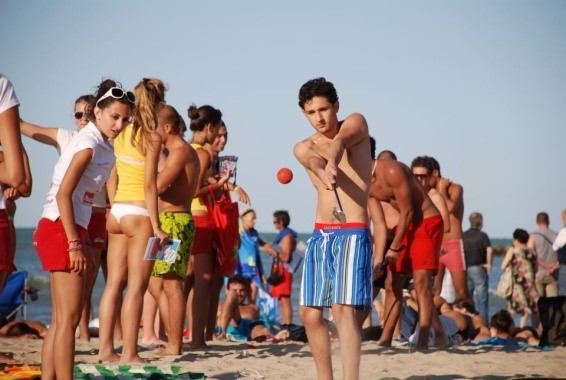 Igraci na plazi